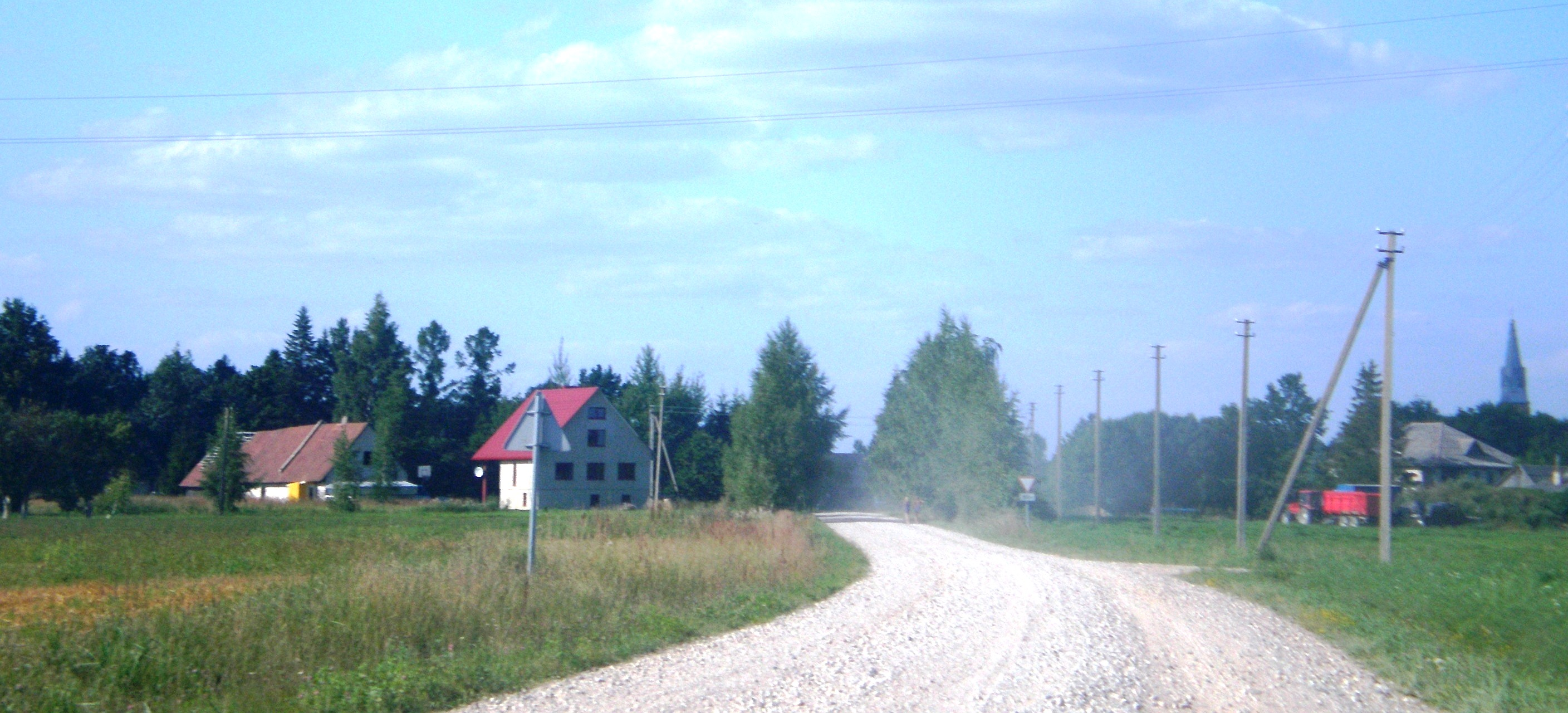 Juodkaimiai, Kėdainių raj.